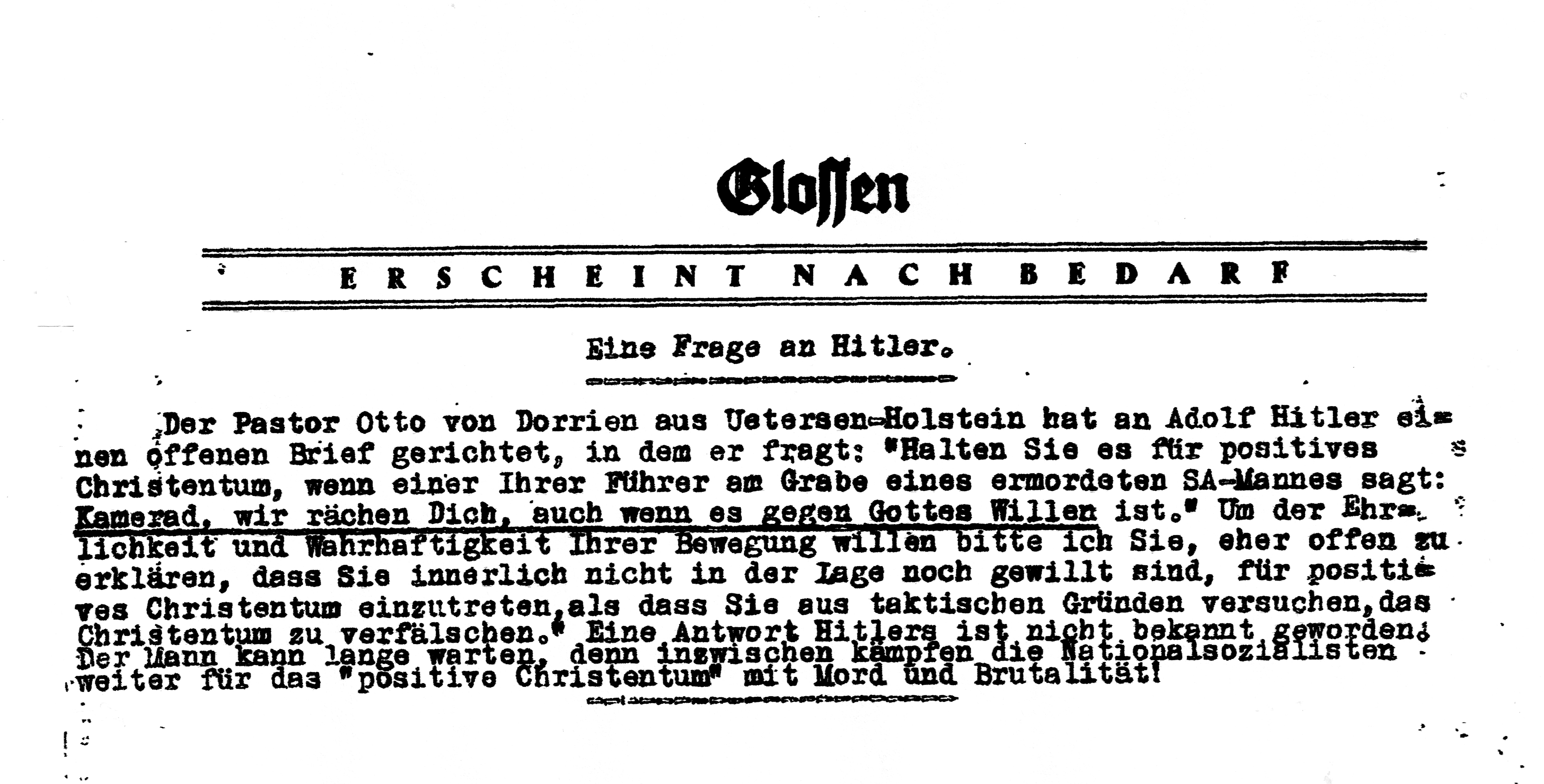 Bericht über einen Brief des Uetersener Pfarrer Otto von Dorien an Adolf Hitler, nochmals nachbearbeitet